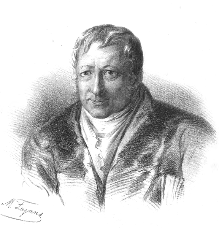 Jerzy Samuel Bandtkie